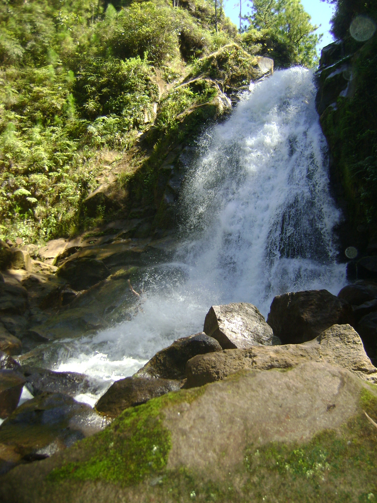 cascada en La Yeguada, Veraguas